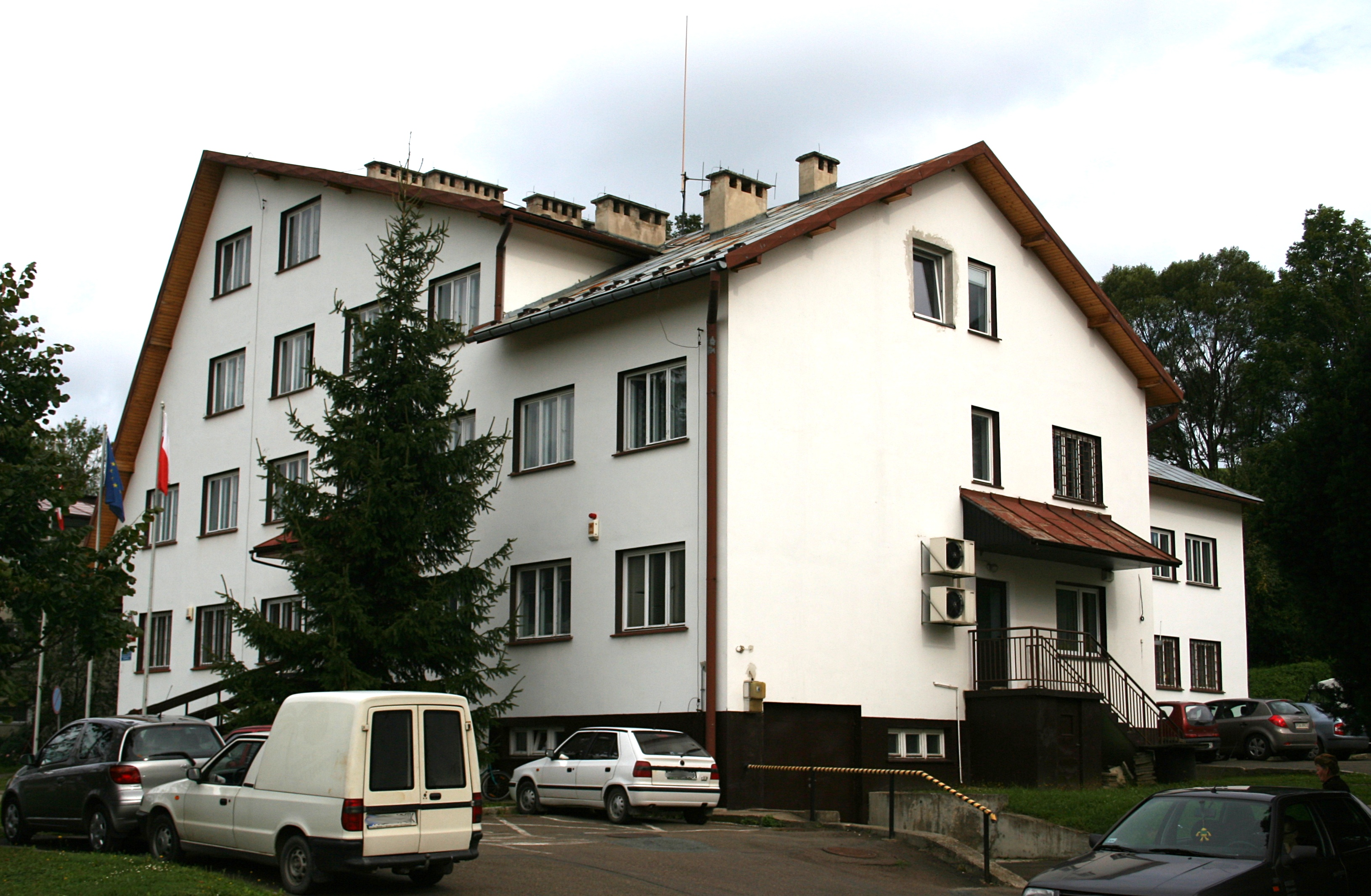 Urząd gminy w Komańczy